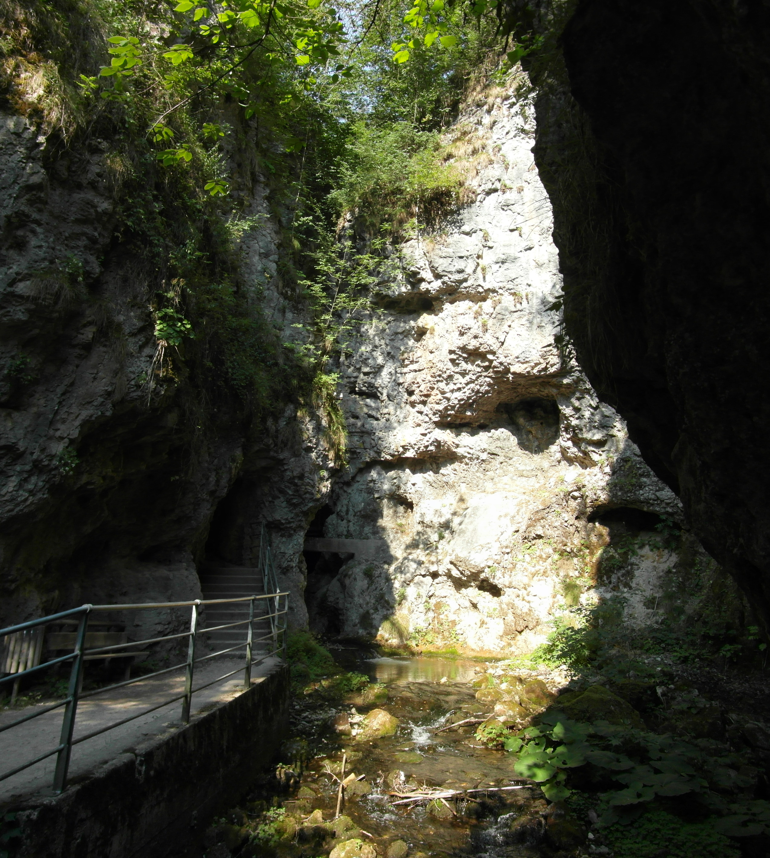 Fondo - passeggiata per il Lago Smeraldo